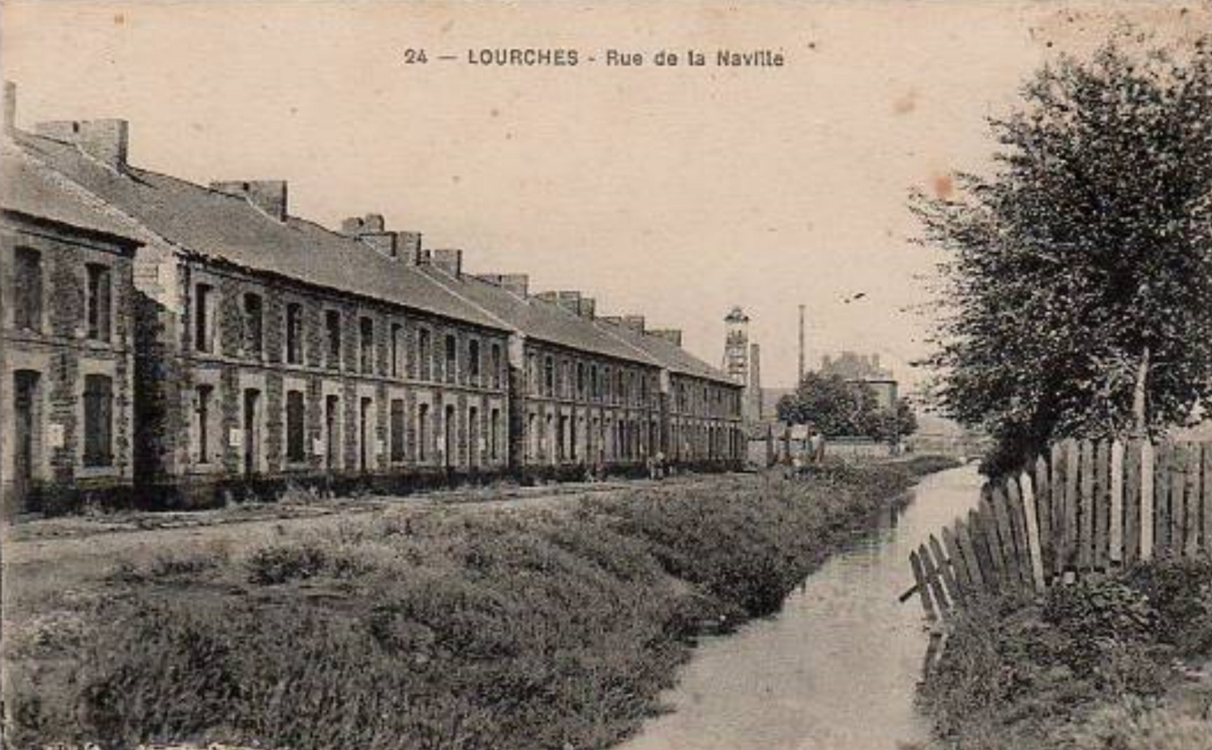 Fosse La Naville de la Compagnie des mines de Douchy, Lourches, Nord, Nord-Pas-de-Calais, France.